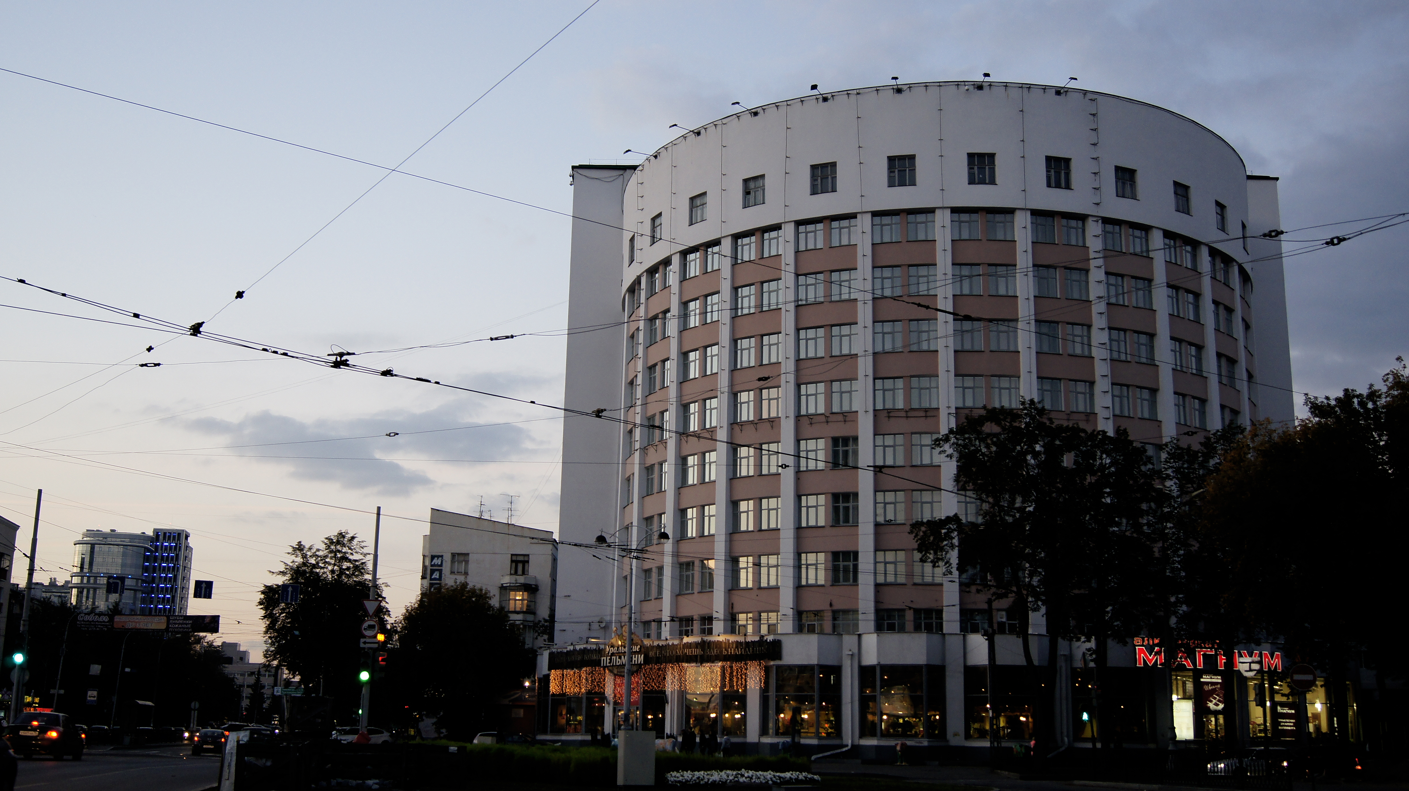 Гостиница «Исеть» (Свердловская область, Екатеринбург, Ленина проспект, 69)